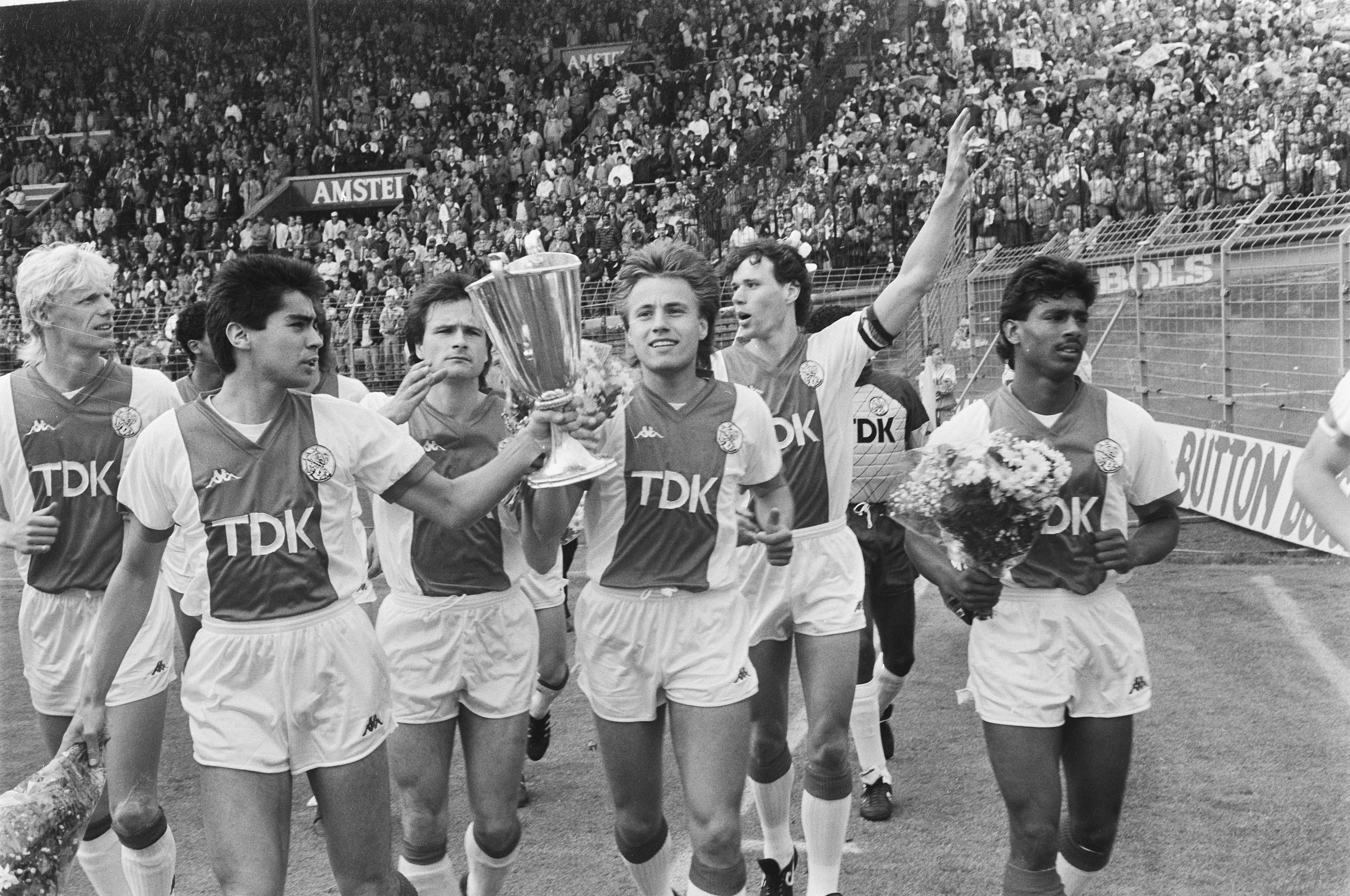 Match de football Ajax - Feyenoord (1-3) à Amsterdam. L'Ajax parade avec le trophée de la coupe des coupes remporté quatre jours plus tôt contre le Lokomotive Leipzig. De gauche à droite Arnold Scholten, Sonny Silooy, Peter Boeve, Rob Witschge, Marco van Basten et Aron Winter.